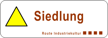 Infosymbol Siedlungen der Route der Industriekultur